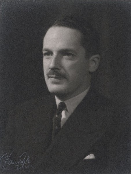 Reginald Dorman